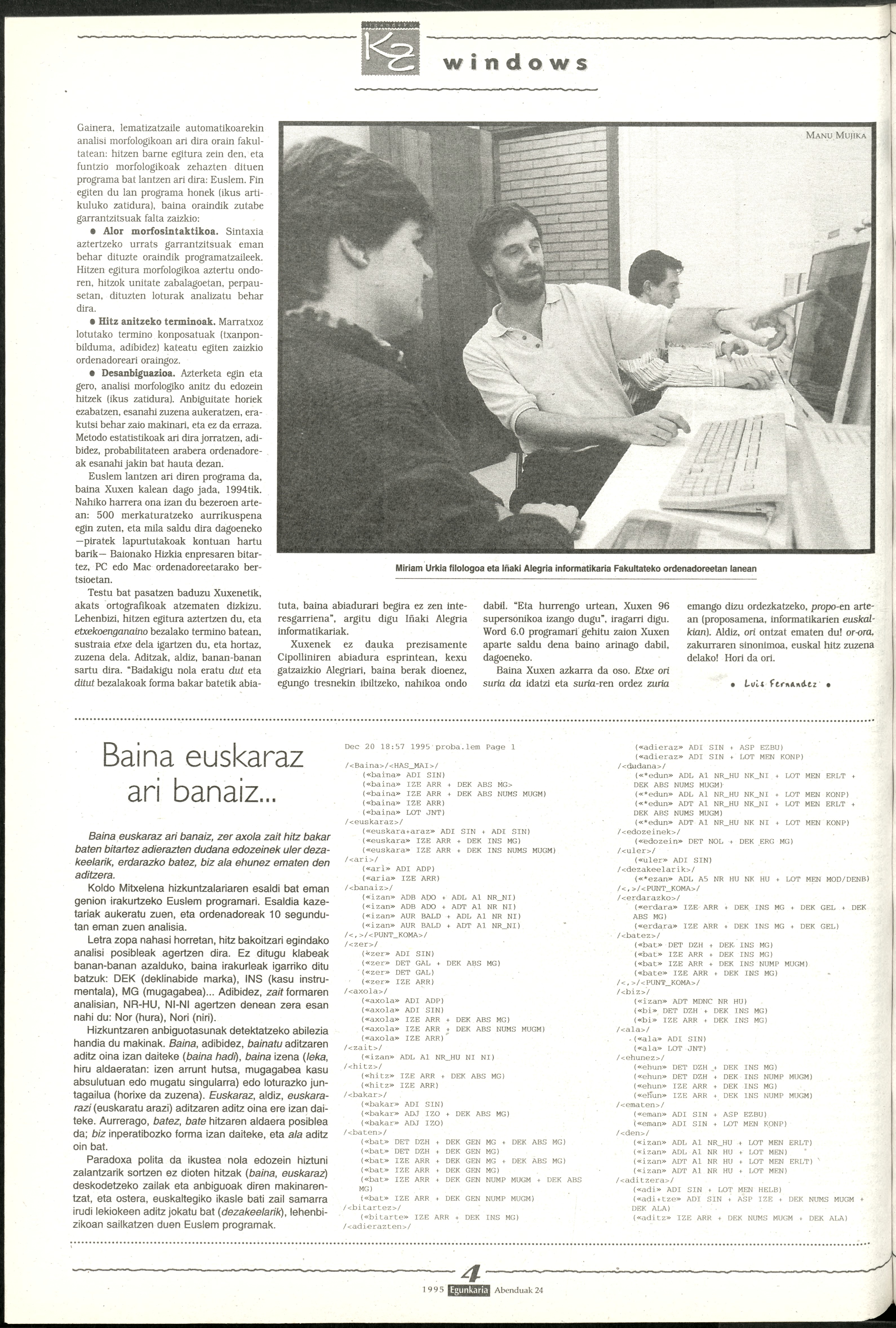 Euskarak 1995ean zuen egoera deskribatzen duen artikulua. Euskaldunon Egunkarian Luistxo Fernandezek 1995eko abenduaren 24 argitaratua.